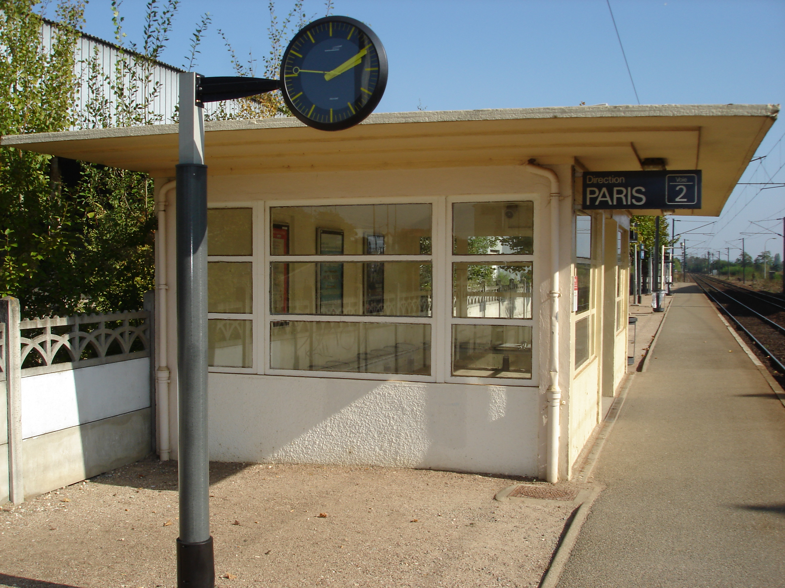 Gare de Houdan (78) : L'abri voyageurs.